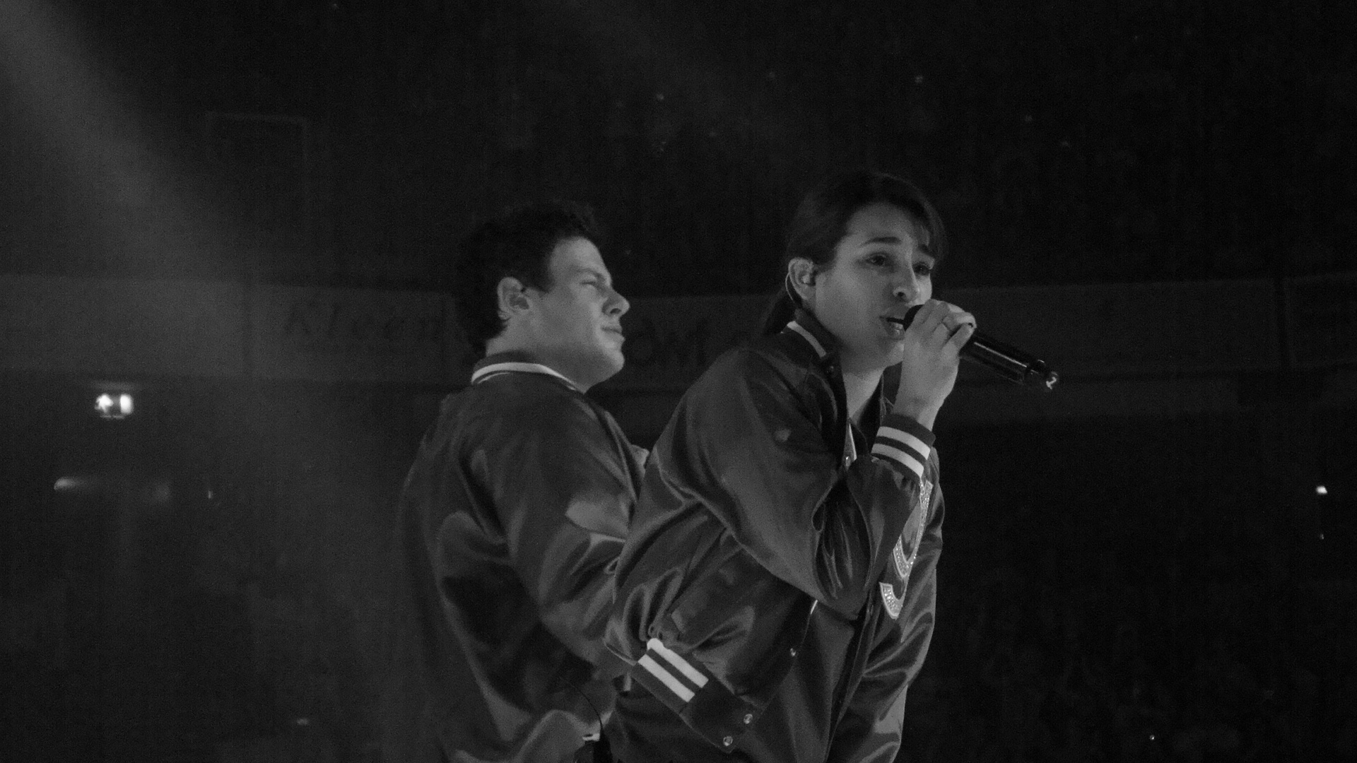 Somebody To Love